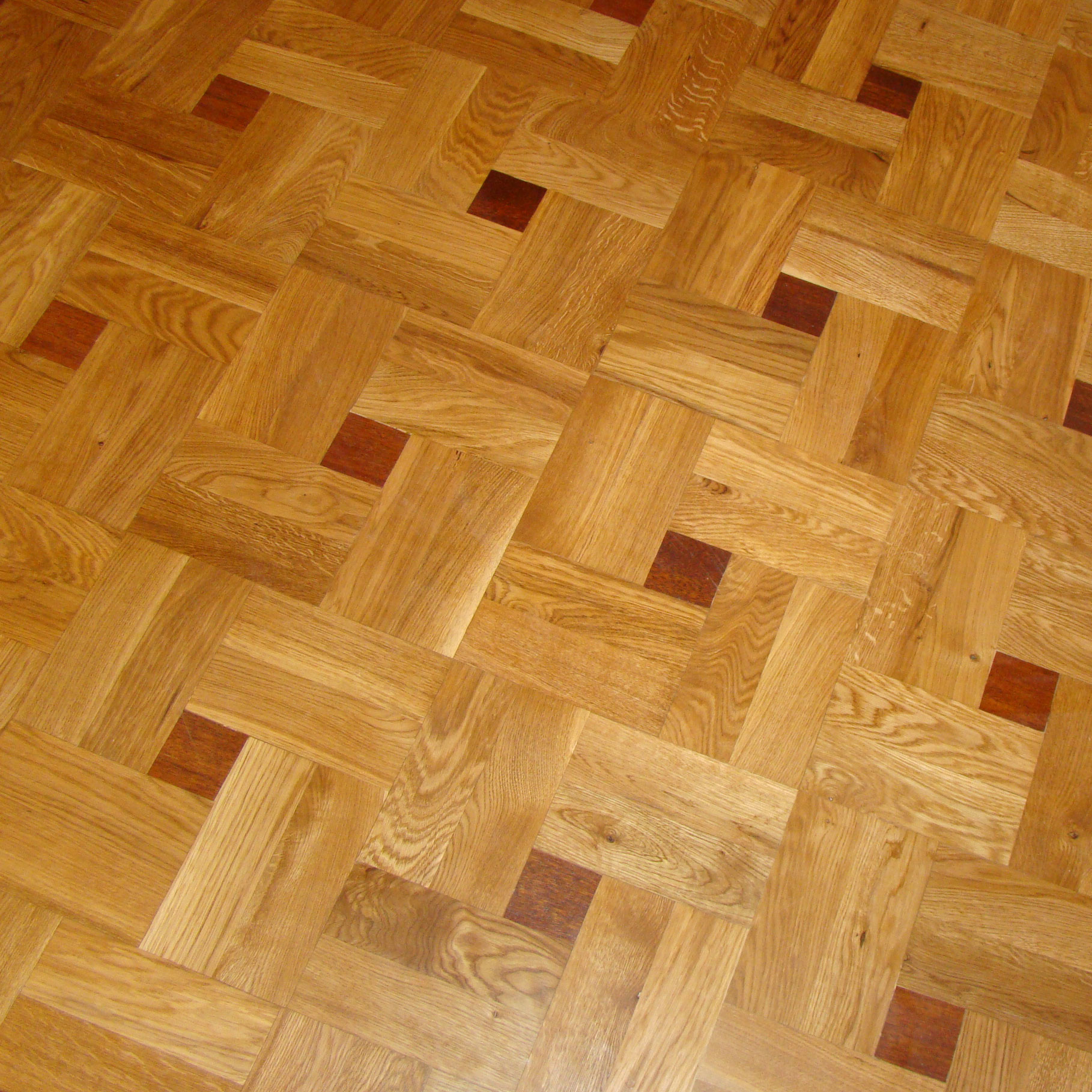 Один из простых рисунков художественной укладки штучного паркета. Применяемые при укладке породы - дуб селекции рустик и мербау. Покрыт лаком Bona D5 в несколько слоев, который "поджигает" рисунок древесины.